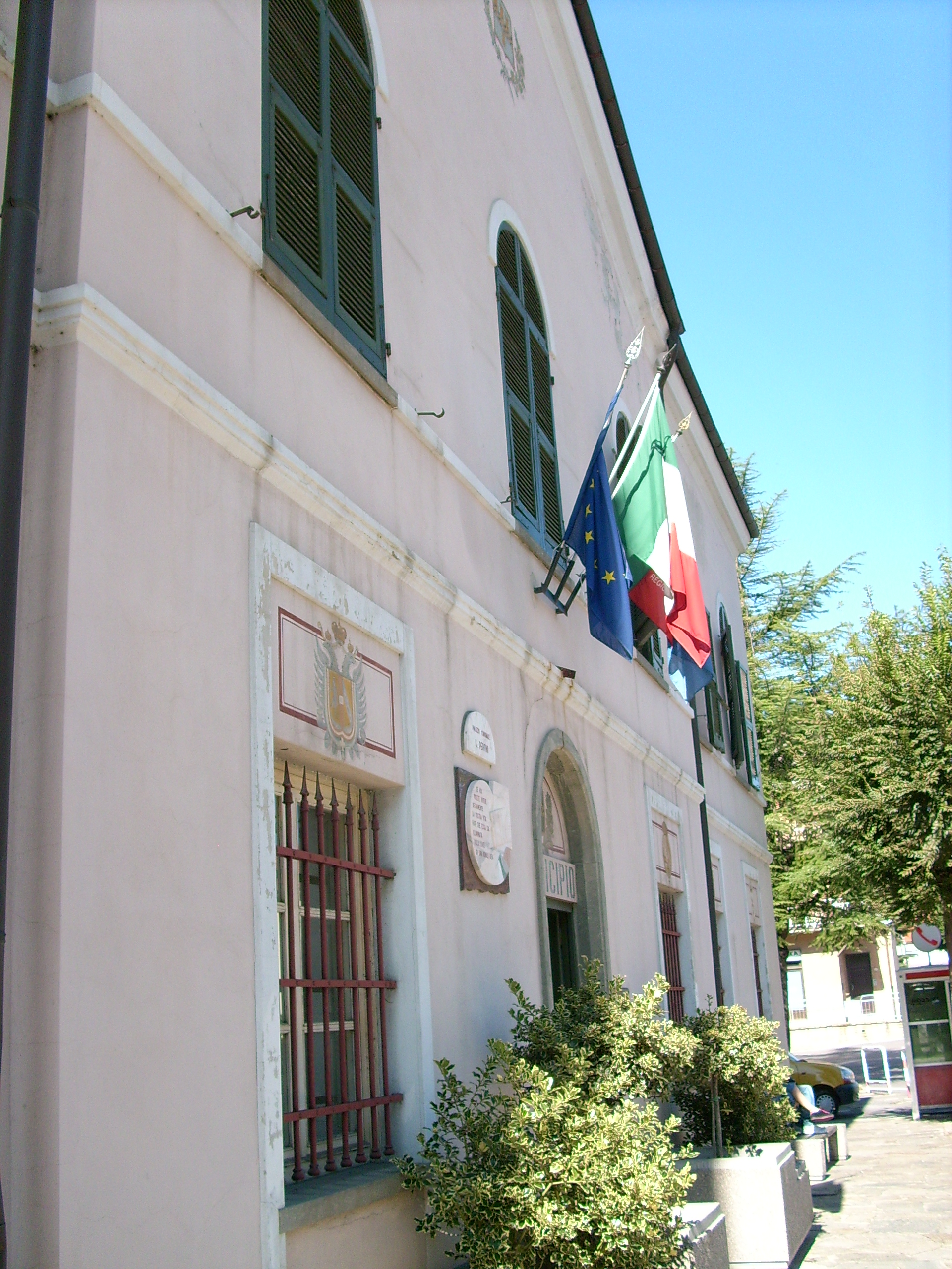 Municipio di Cairo Montenotte, Liguria, Italia